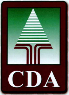 Antic logotip de Convergència Democràtica Aranesa fins l'any 2009